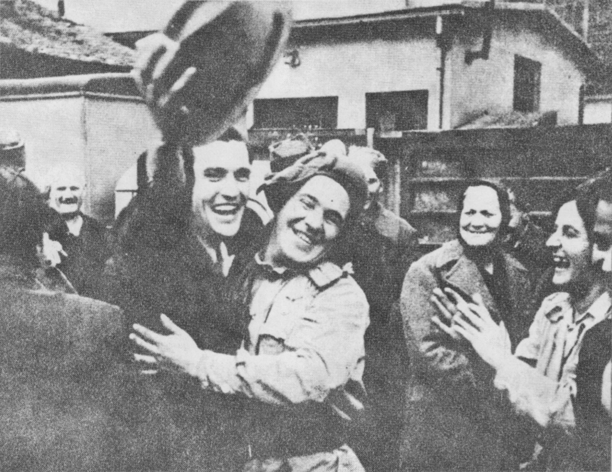 Srpskohrvatski / српскохрватски: Crvenoarmejac okružen narodom u oslobođenom Beogradu 1944. godine.